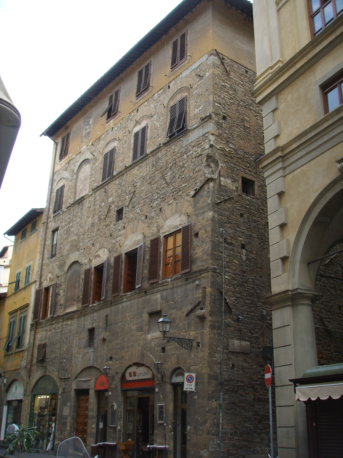 Palazzo Fagni-Da Diacceto2